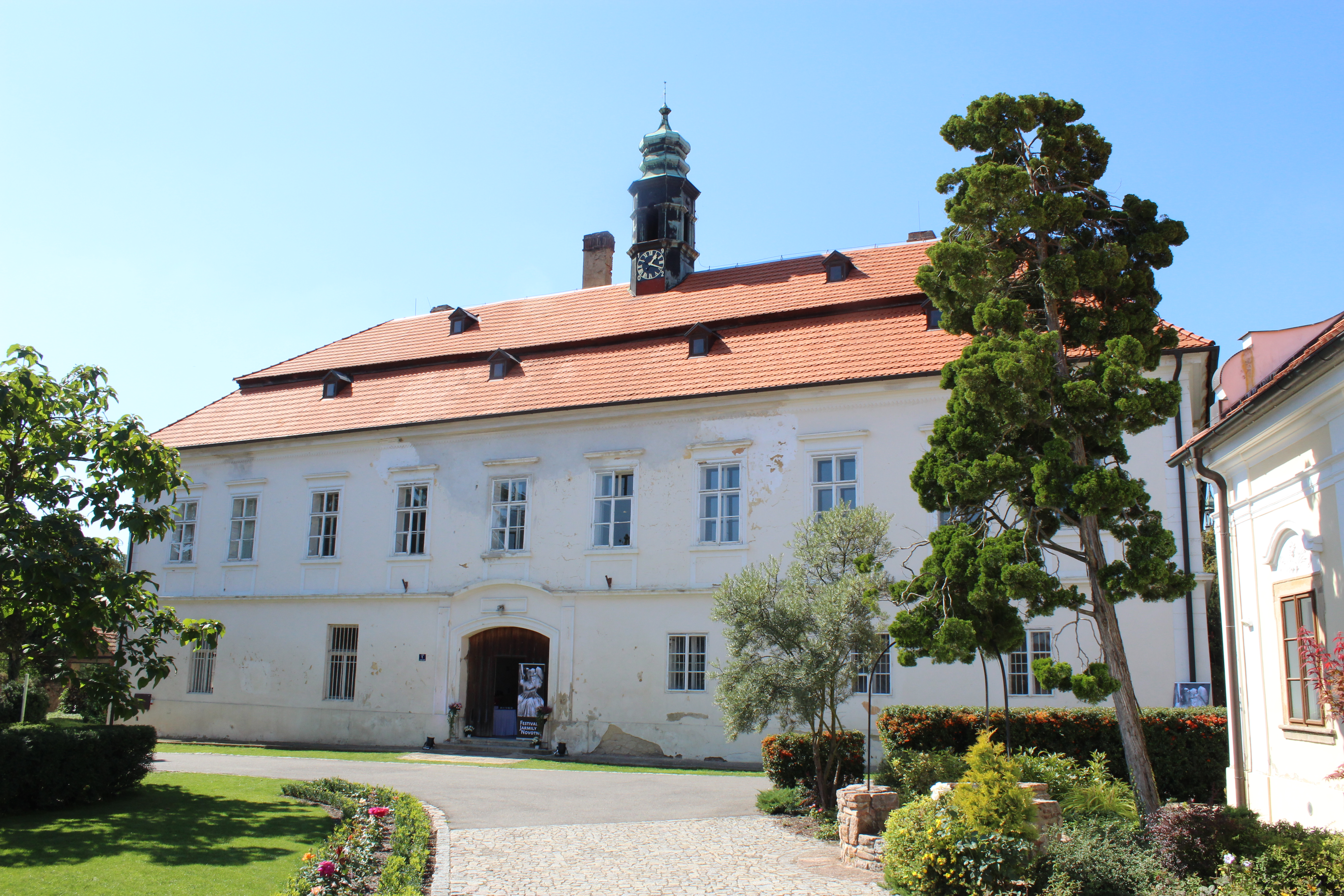 byl založen 1195 jako tvrz. 1648 byl přestavěn do dnešní barokní podoby.